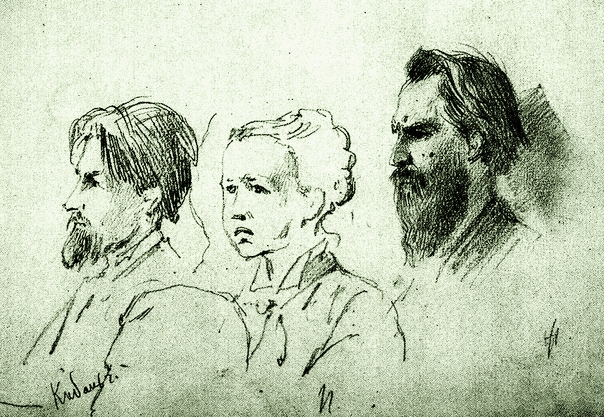 Schizzo di Kibal'cic, Perovskaja, e Zheljabov al processo per l'assassinio di Alessandro II. Opera di Konstantin Makovskij